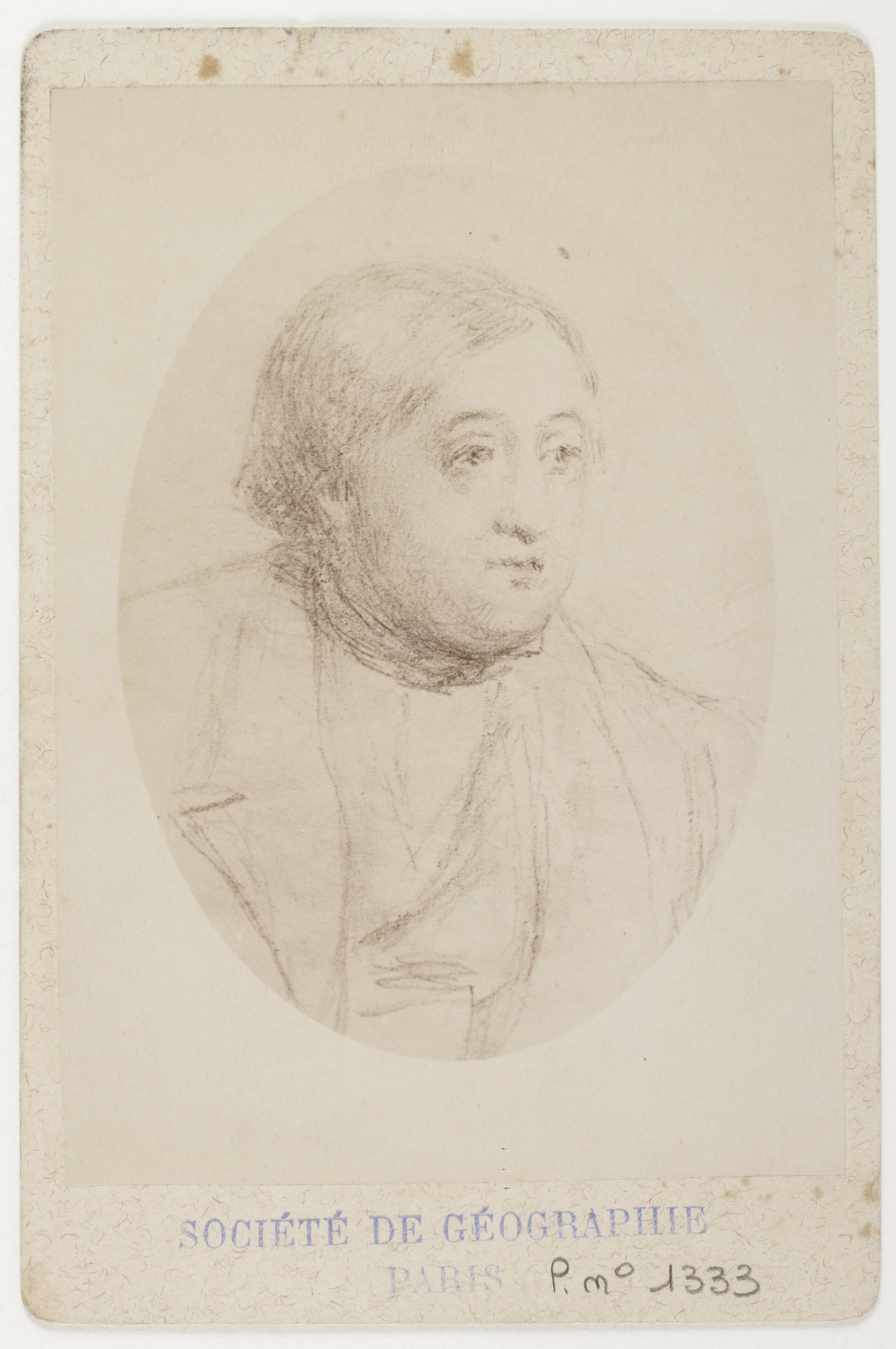 Portrait de Nicolas de Khanikoff